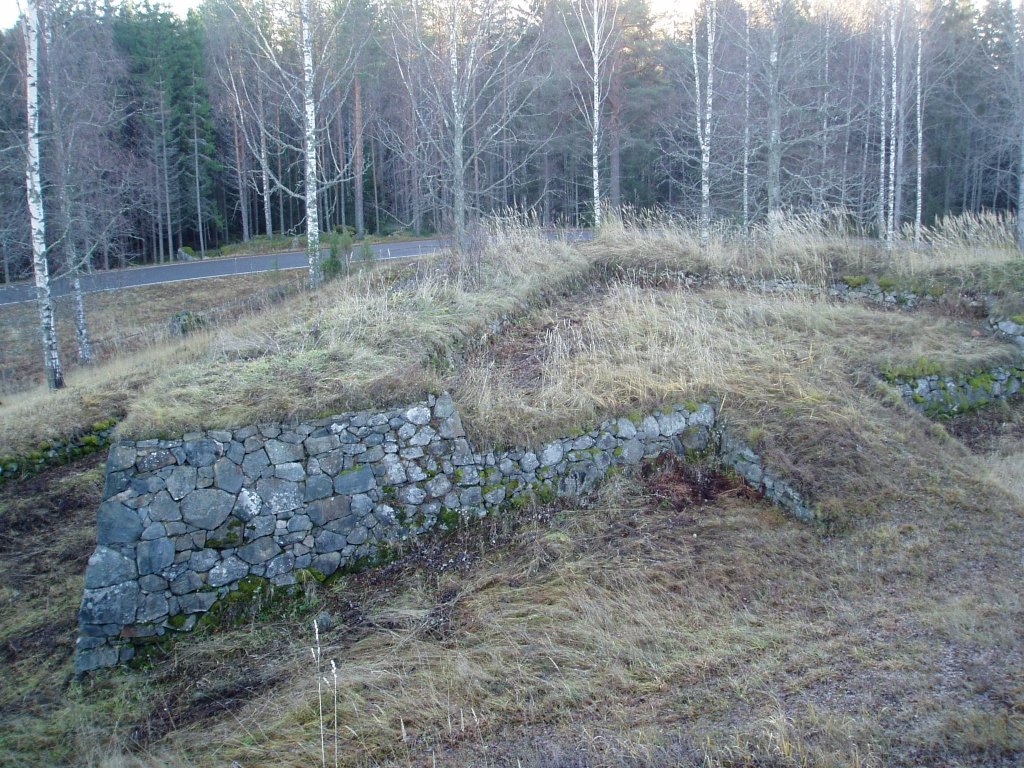 Kärnäkosken linnoituksen ravelliini.